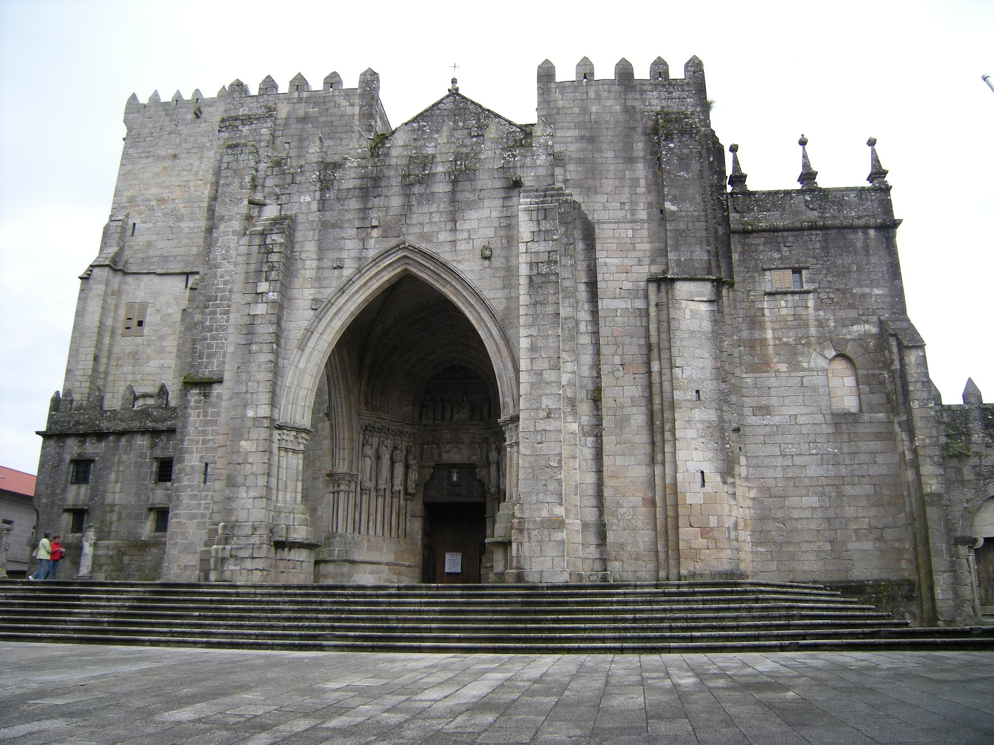 Catedral de Tui.